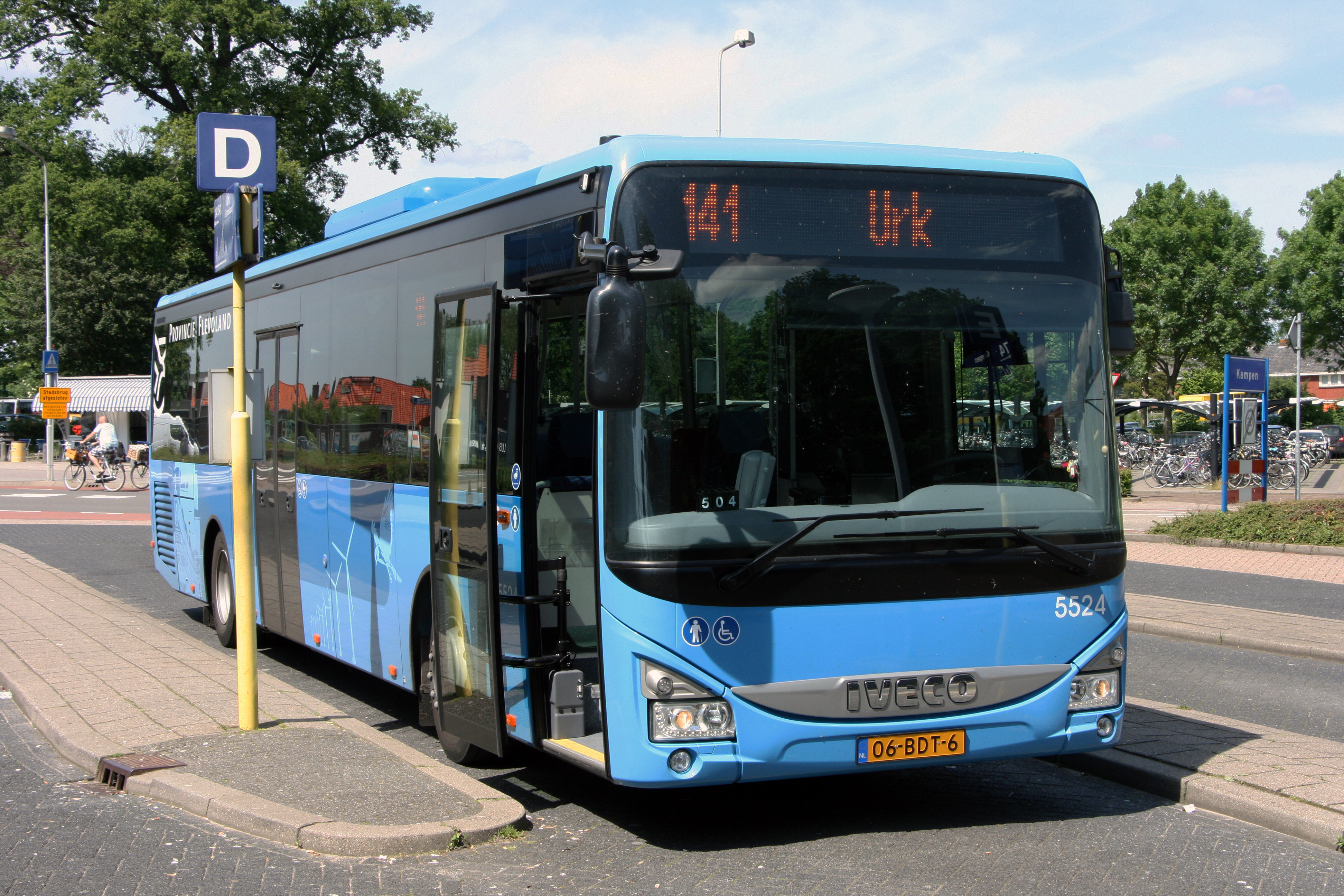 Lijn 141 naar Urk op station Kampen. Voertuignummer 5524, 06-BDT-6, Kampen 31 mei 2014. OV Regio IJsselmond is 100% dochter van Connexxion.